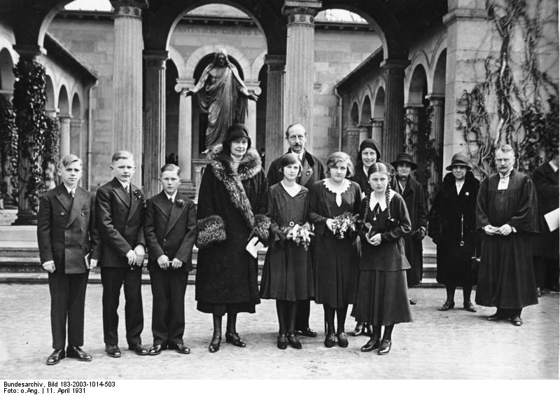 Potsdam, Kronprinzessin Cecilie Scherl: Die Kaiserin Augusta Viktoria Gedächtnis-Stiftung konfirmierte heute [11.4.1931], am Todestage der Kaiserin, ihre Zöglinge in der Friedenskirche in Potsdam durch Hofprediger Dr. Vogel. Kronprinzessin Cäcilie, Prinz August Wilhelm und Prinzessin Oskar wohnten der Konfirmation bei. 11443-31 Abgebildete Personen: Preußen, Cecilie von: 1886-1954, verheiratet mit Kronprinz Wilhelm, Tochter Großherzog Friedrich Franz III. von Mecklenburg-Schwerin, Deutschland Preußen, August Wilhelm von: 1887-1949, preußischer Staatsrat, MdR, SA-Obergruppenführer, Deutschland